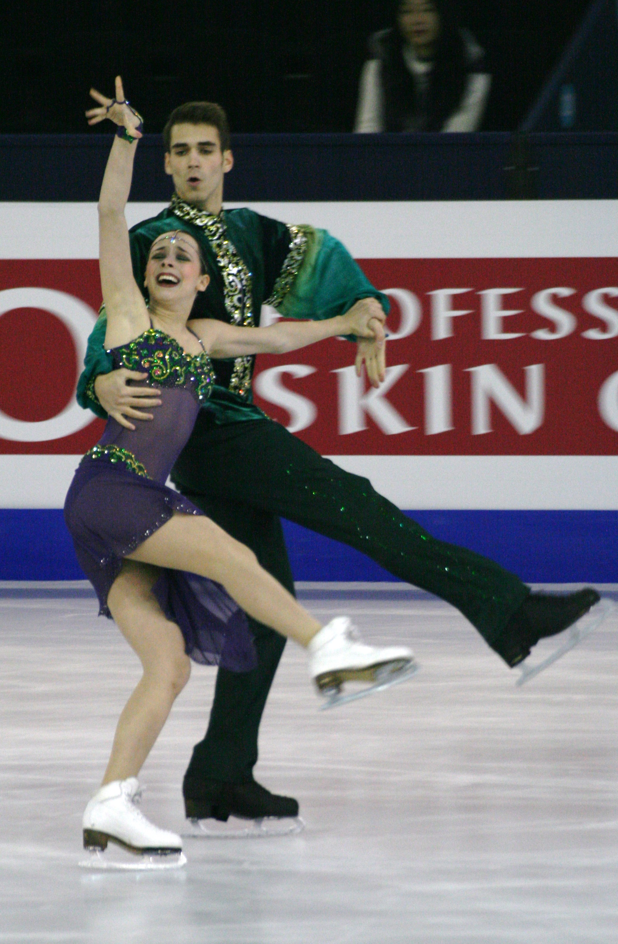 Бетина Попова и Юрий Власенко (Россия) на финале Гран-при среди юниоров 2014-2015.